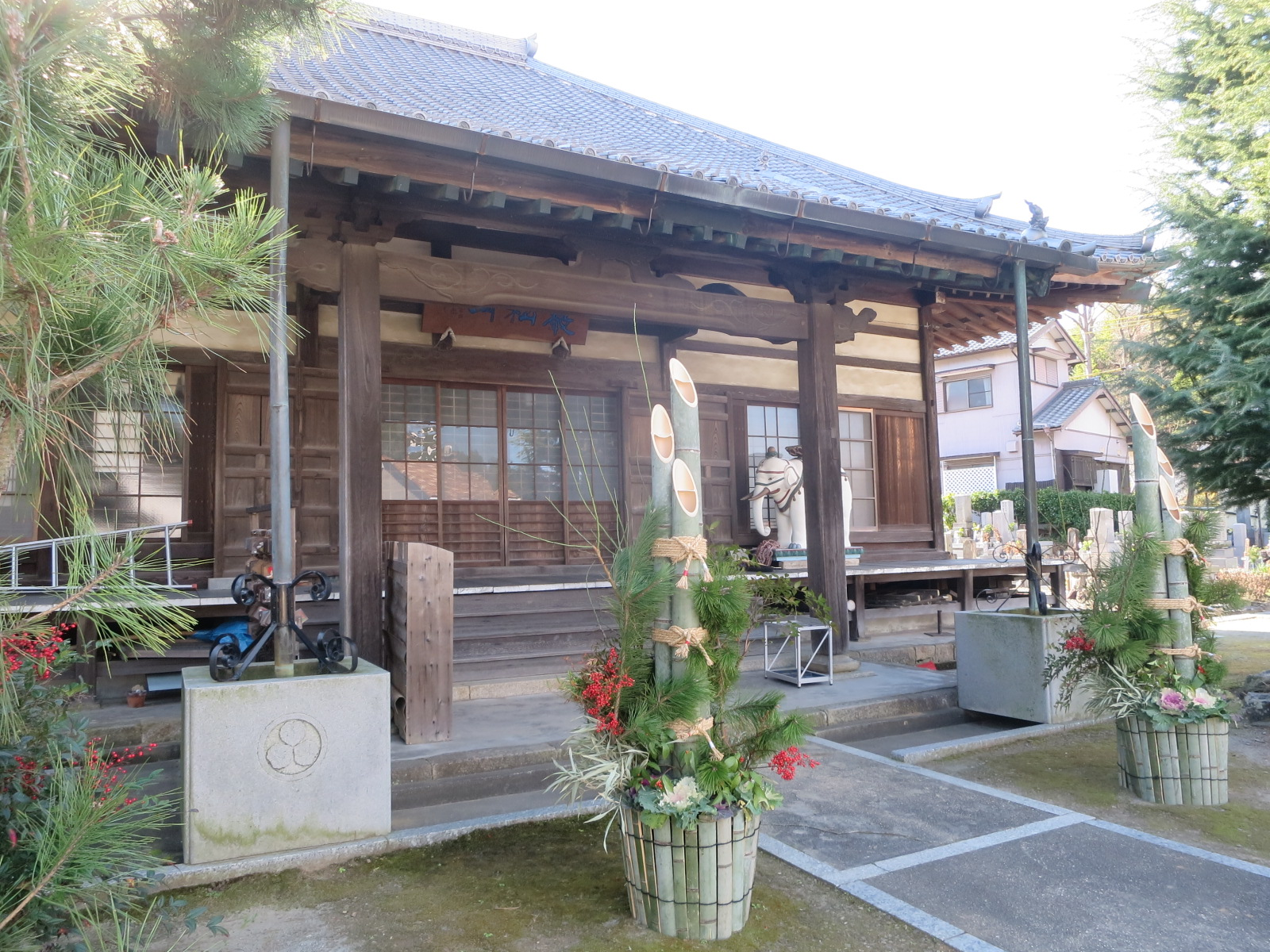 称名寺（岡崎市藤川町）